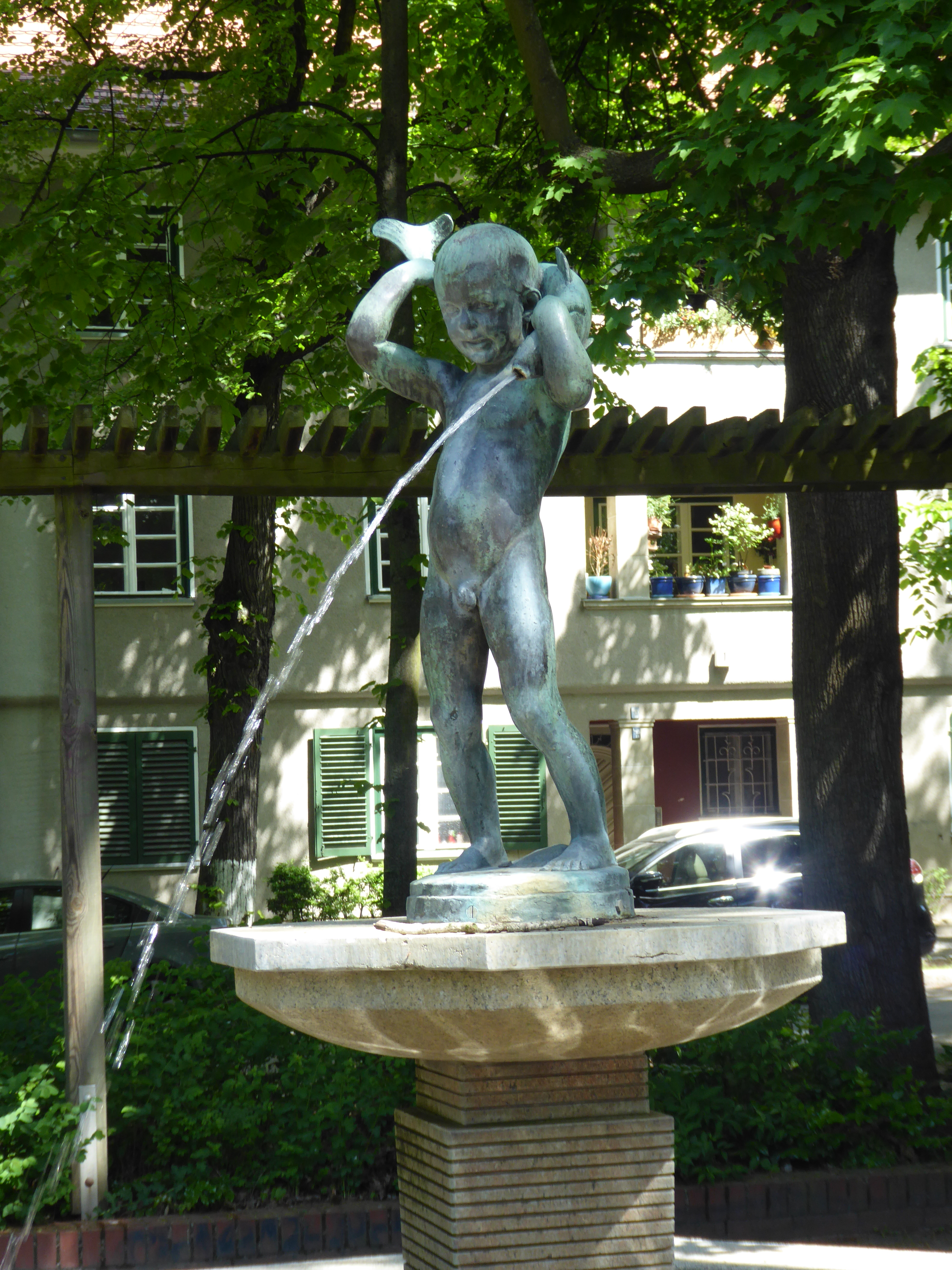 Schmargendorf Kissinger Platz Brunnen Knabe mit Fisch von Paul Leibküchler (1925)